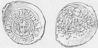 Деньги Андрея Фёдоровича Ростоского (1371—1380)